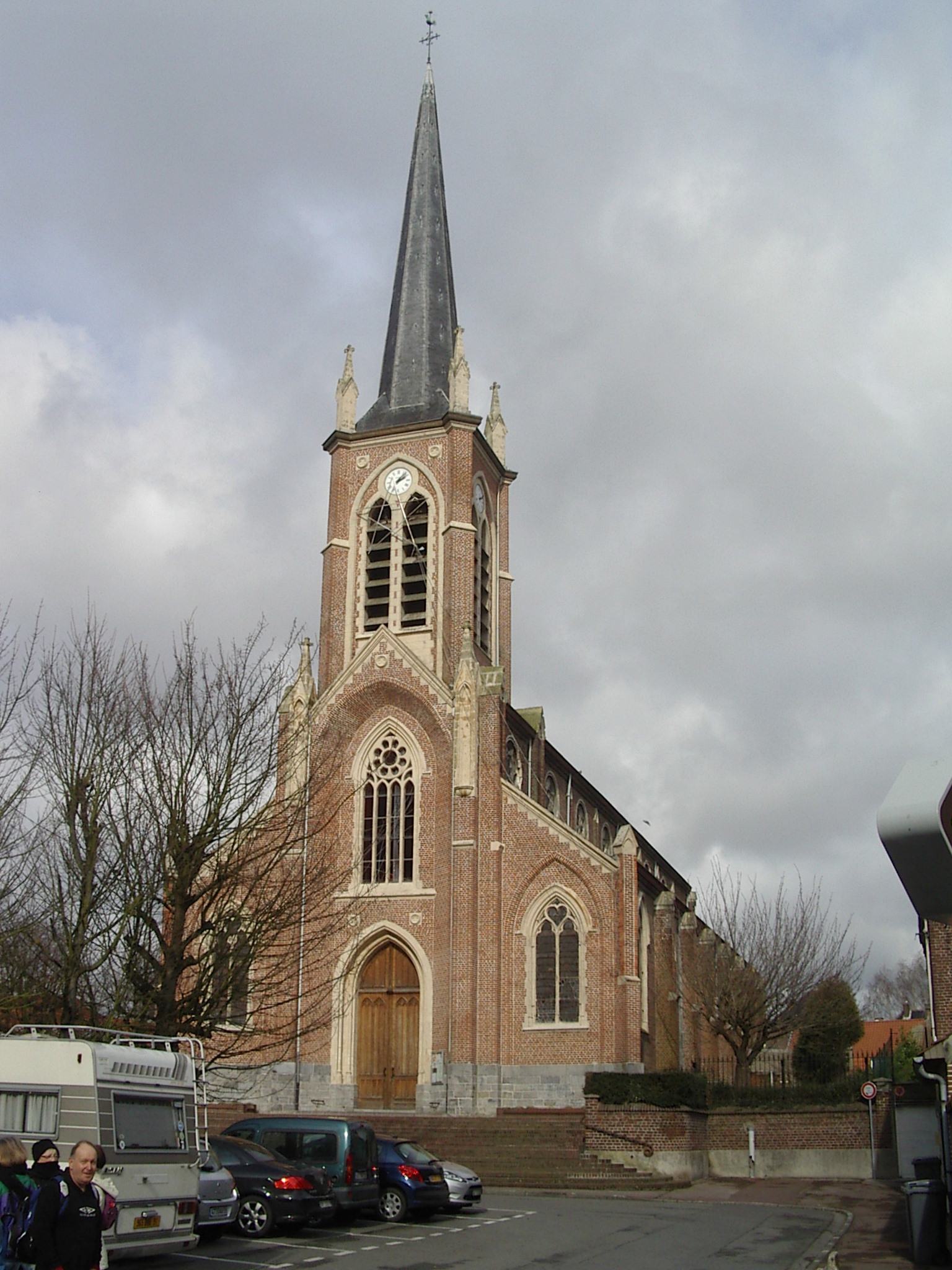 Eglise de Willems (France, Nord)